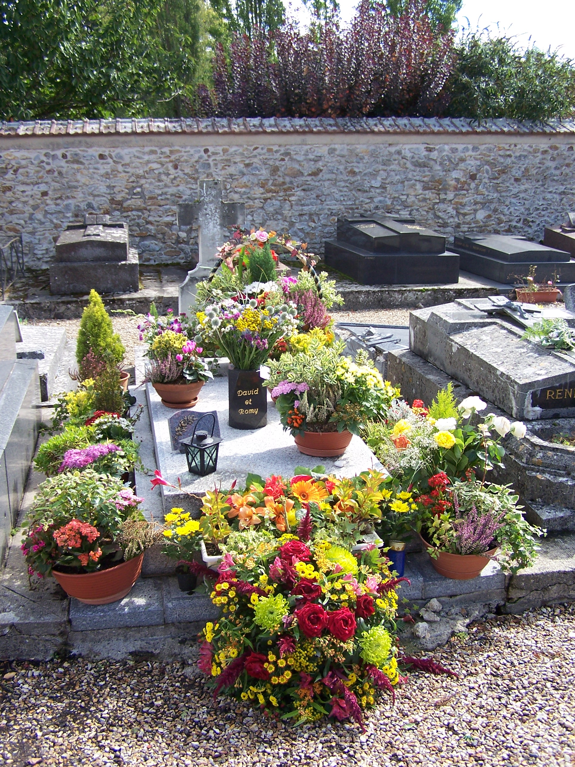 Tombe de Romy Schneider de Boissy-sans-Avoir (Yvelines, France)